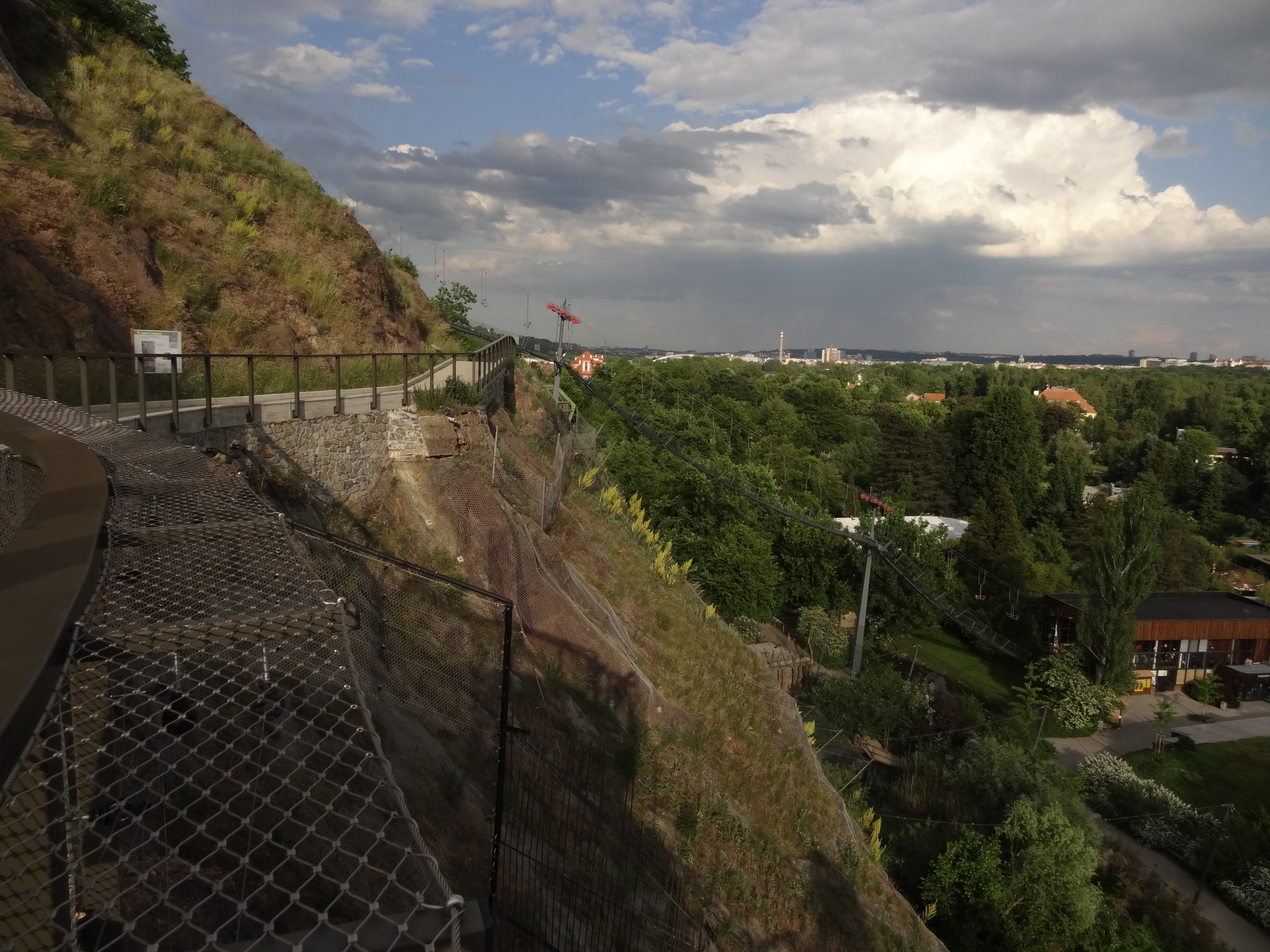 Praha-Troja - přírodní památka Skály v zoologické zahradě chránící odkryv transgresních sedimentů ordoviku na zvrásněných proterozoických vrstvách ve starém nárazovém břehu Vltavy s výskytem chráněných a ohrožených druhů rostlin (skalní vegetace s kostřavou sivou svazu Festucion pallentis) a živočichů (bezobratlí, početně významný výskyt plazů, zejména ještěrky zelené)